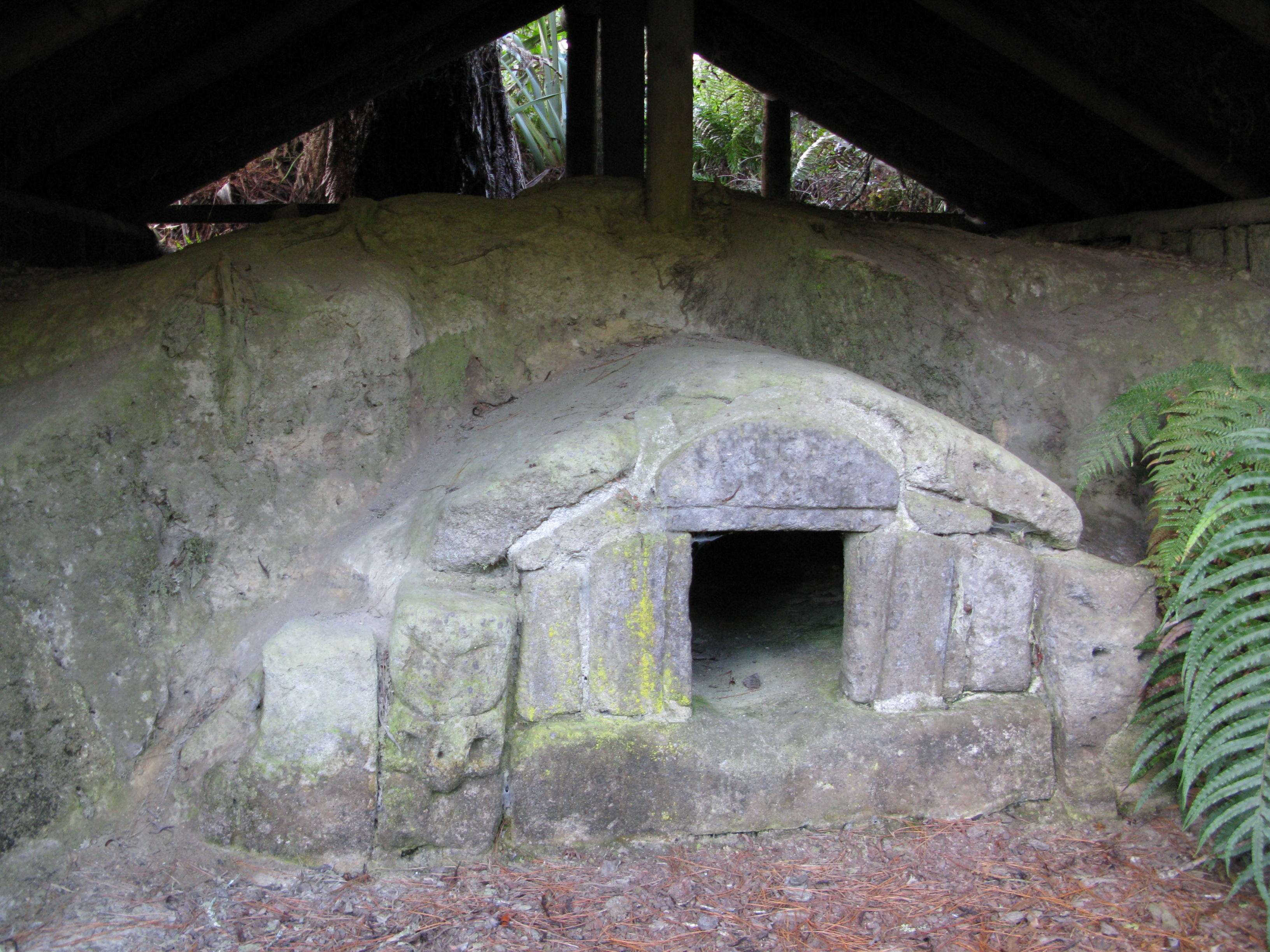 Four dans le buried village.